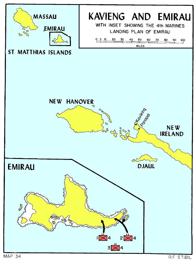 Kavieng and Emirau